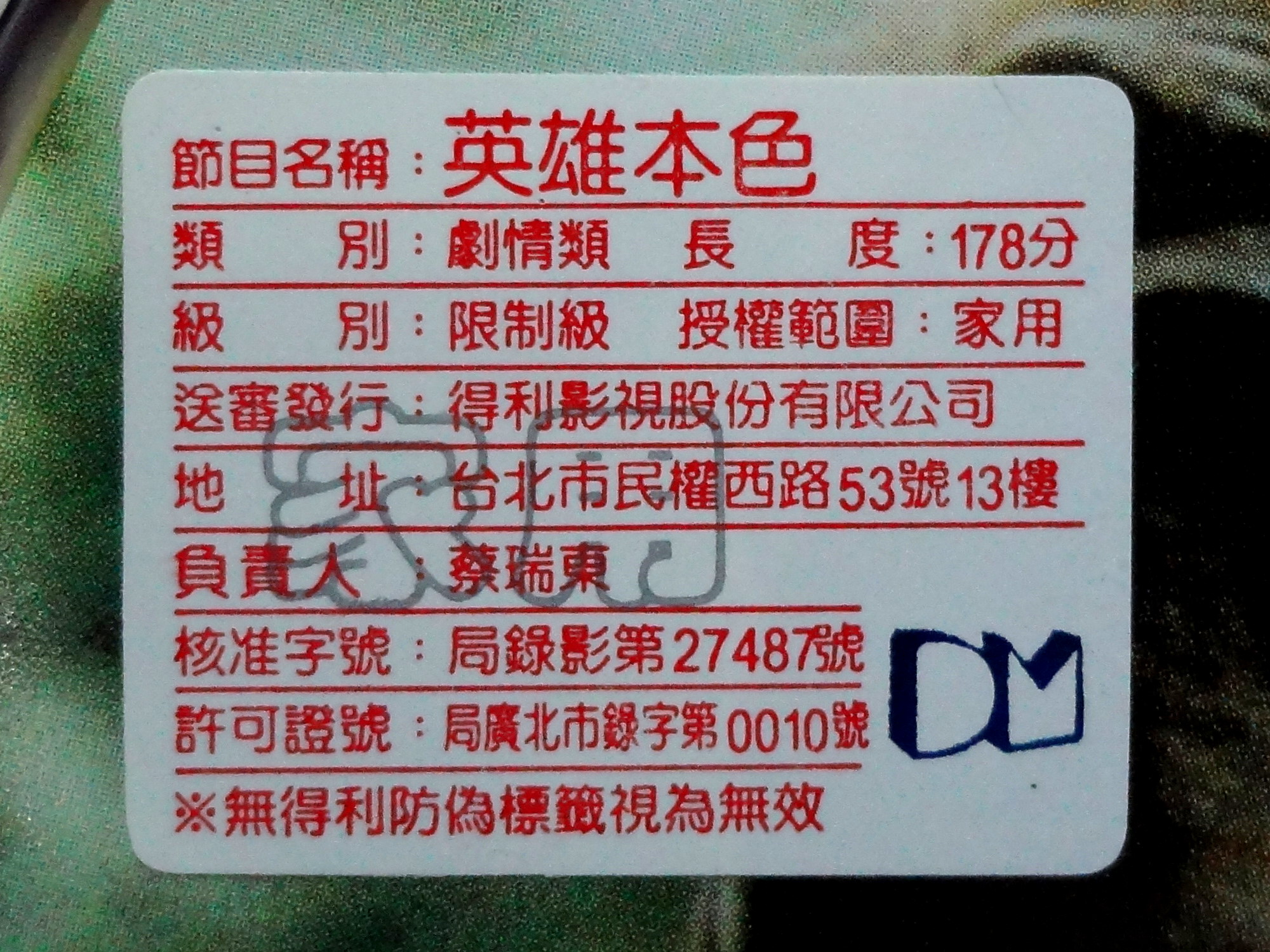 得利影視發行的電影《梅爾吉勃遜之英雄本色》（Braveheart）DVD-Video碟片上的規格標籤。此碟片是某電影雜誌的贈品，沒有外盒，所以規格標籤貼在碟片印刷面。